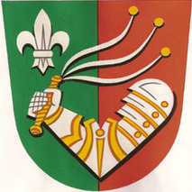 znak obce Zámrsky